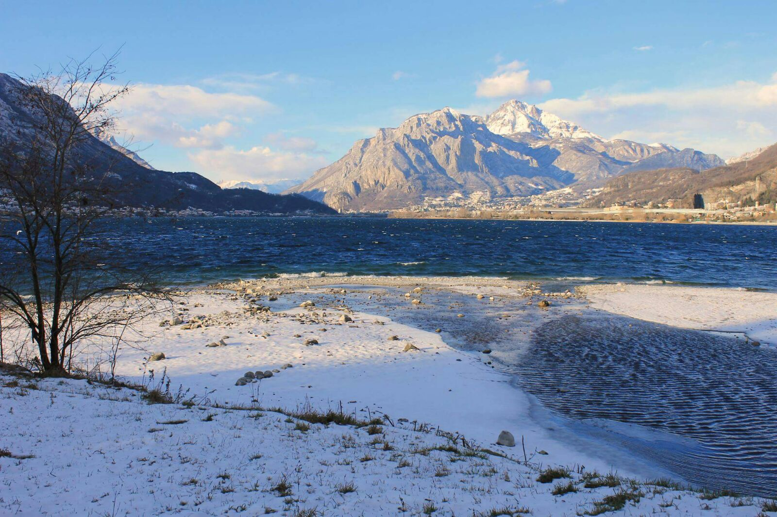 Torrente Gallavesa di Vercurago che sfocia nel lago di Garlate in inverno